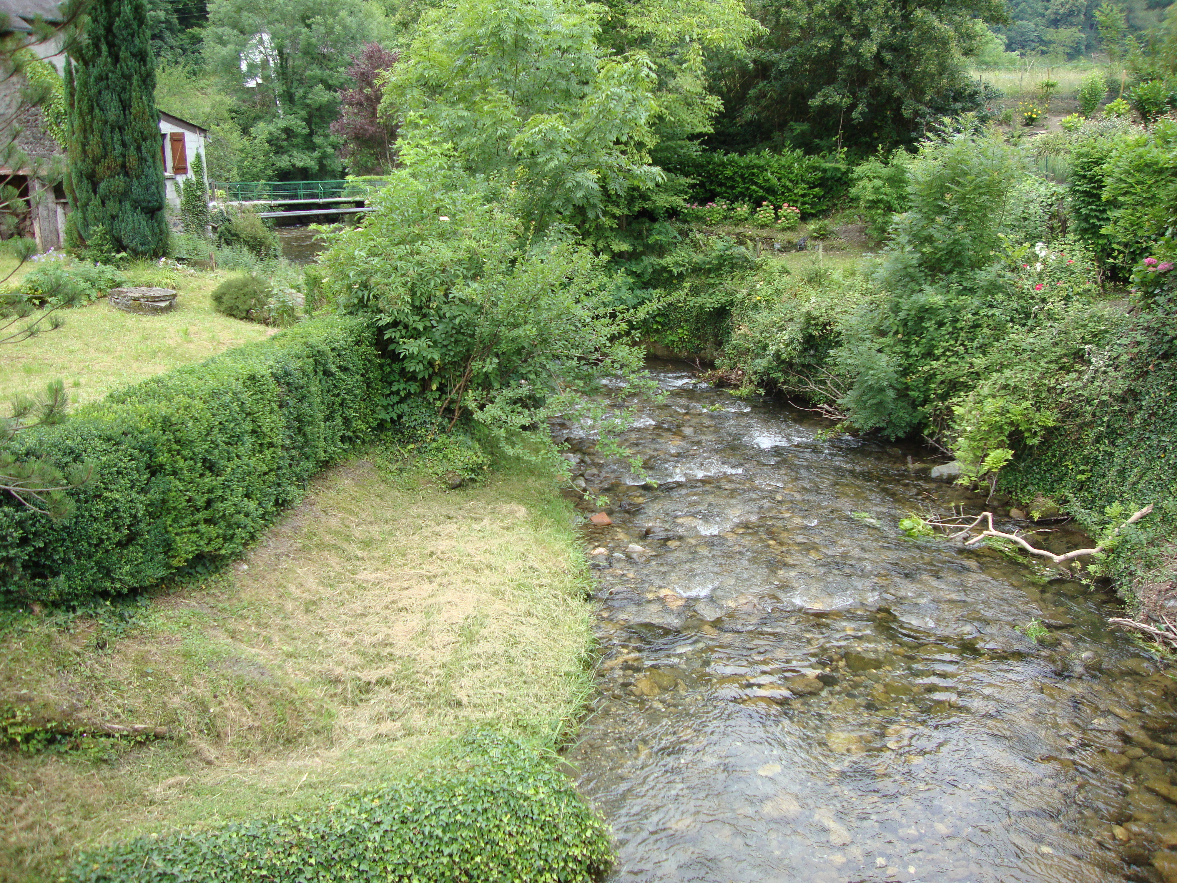 Escot (Pyr-Atl, Fr) Barescou (river)